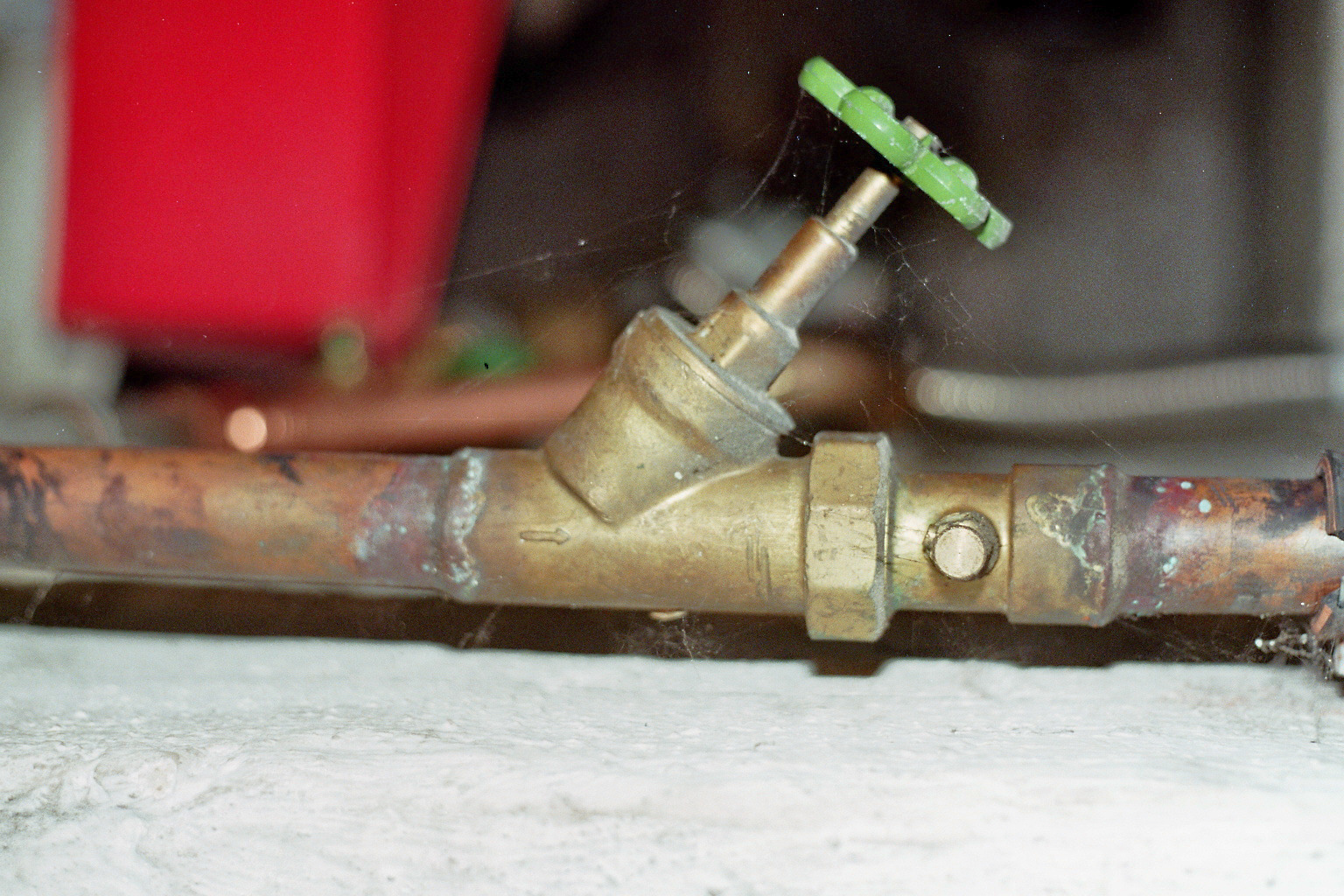 Absperrventil einer Hausinstallation für Trinkwasser